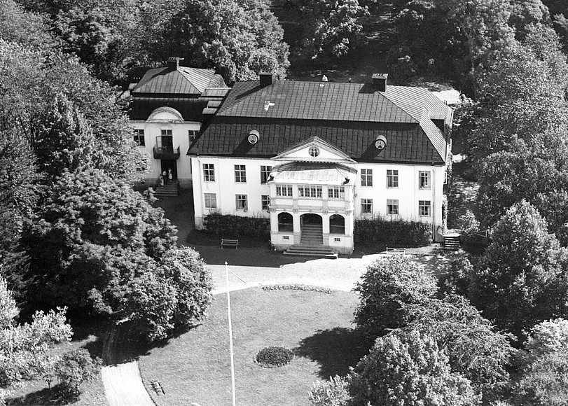 Flygfoto över huvudbyggnaden på Sandbro säteri, Björklinge socken, Uppland 1936